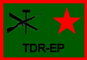 Bandera de las Tendencia Democrática Revolucionaria-Ejército del Pueblo